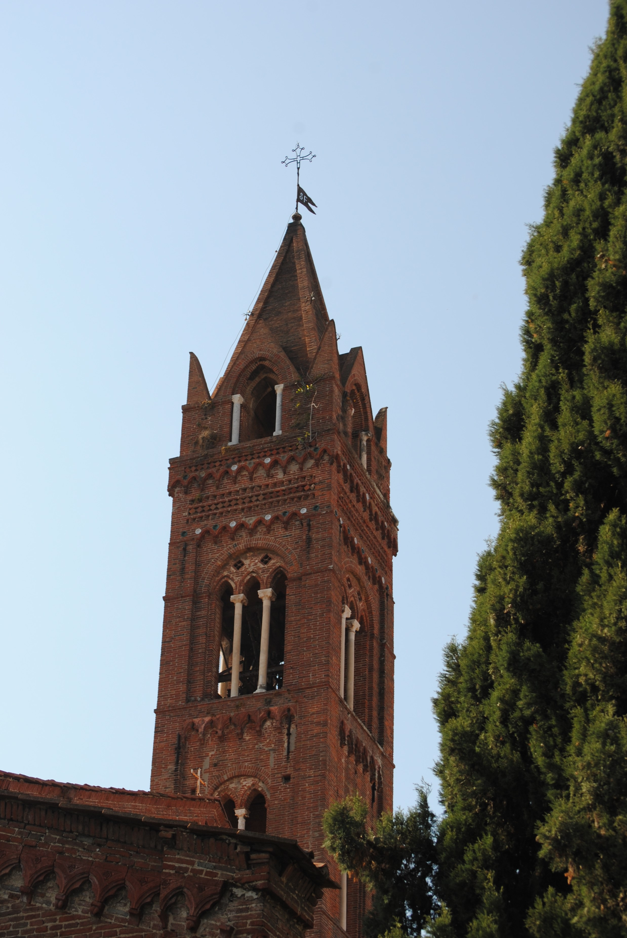 Campanile della chiesa di San Francesco decorato con bacini ceramici posti tra le giunture degli archetti ciechi trilobati. I recipienti originali sono stati rimossi a fini conservati e conservati presso il Museo nazionale di San Matteo.